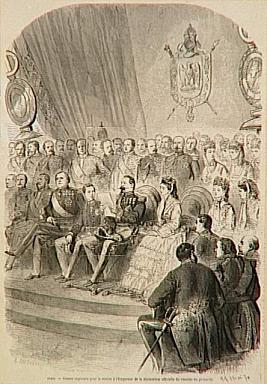 1870 8 mai